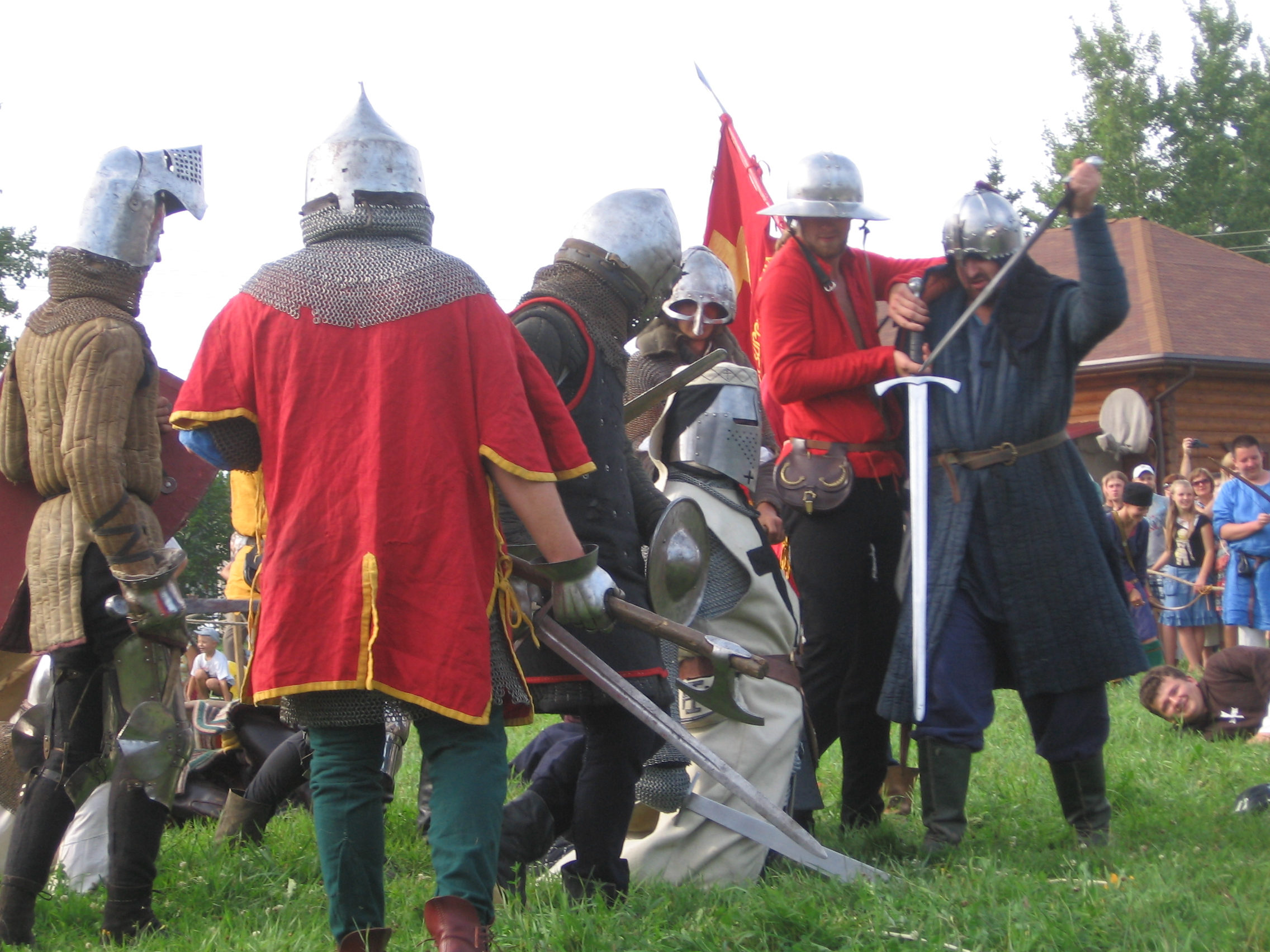 Беларуская (тарашкевіца): Дудуткi, Грунвальд-600. Рэканструкцыя бiтвы, забойства Вялікага магістра Ульрыха фон Юнгінгэна